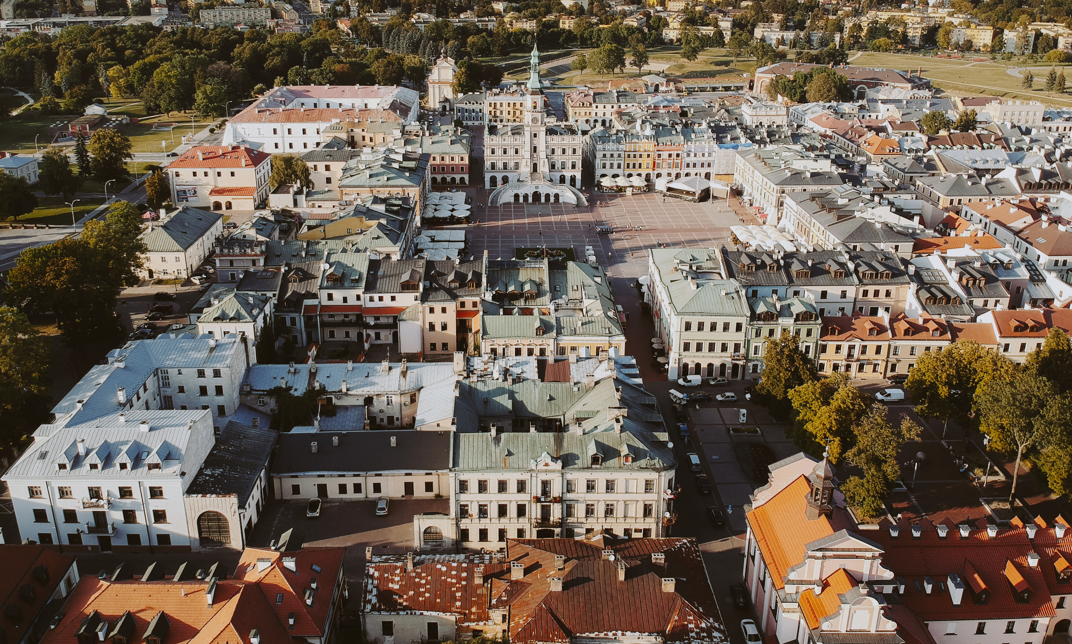 Zamojskie Stare Miasto wykonane z wysokości około 100 metrów.